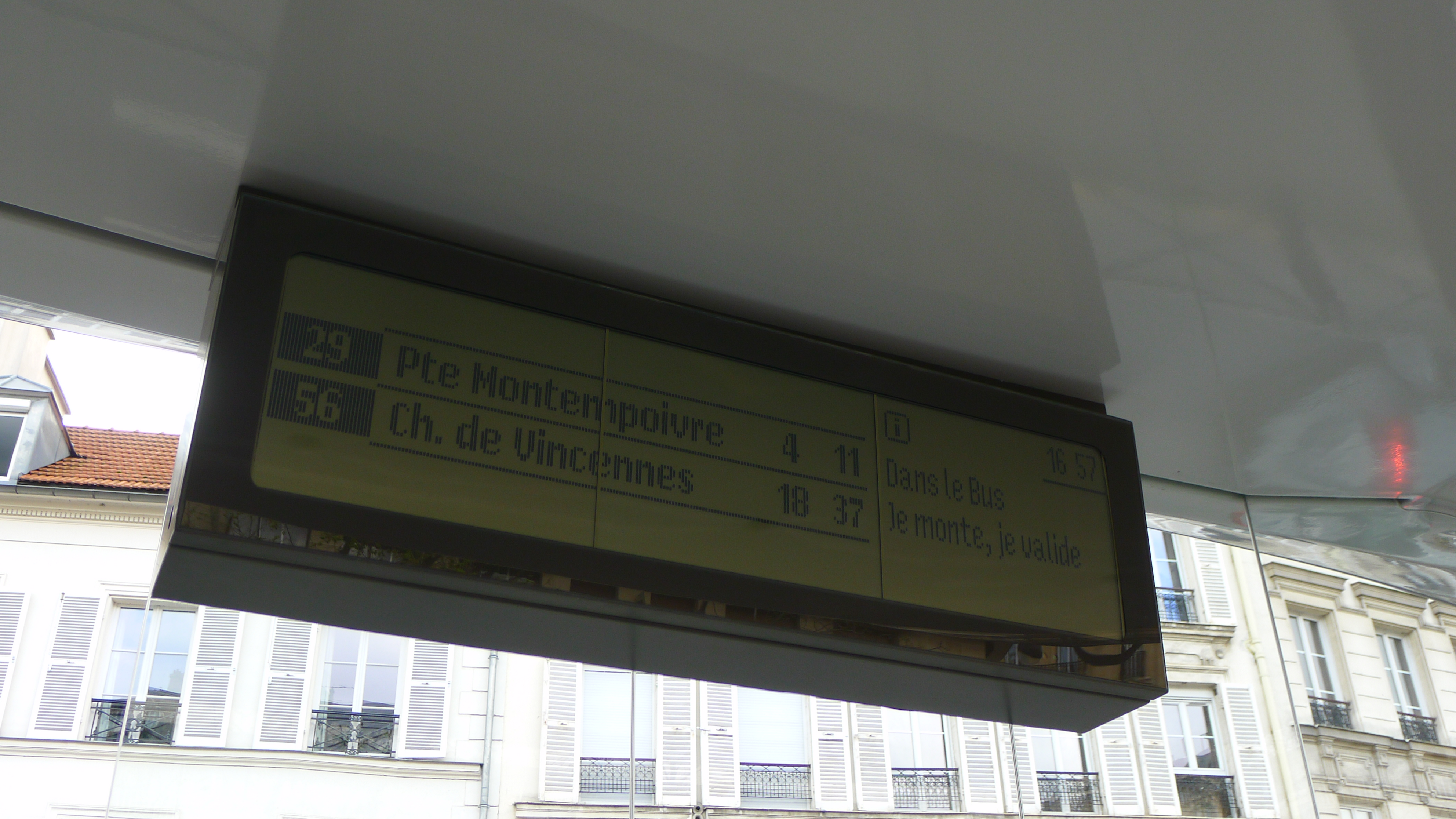 Panneau SIEL des nouveaux abribus parisiens à l'arrêt Docteur Netter (Avenue de Saint-Mandé) des lignes de bus RATP 29 et 56 dans le 12e arrondissement de Paris.